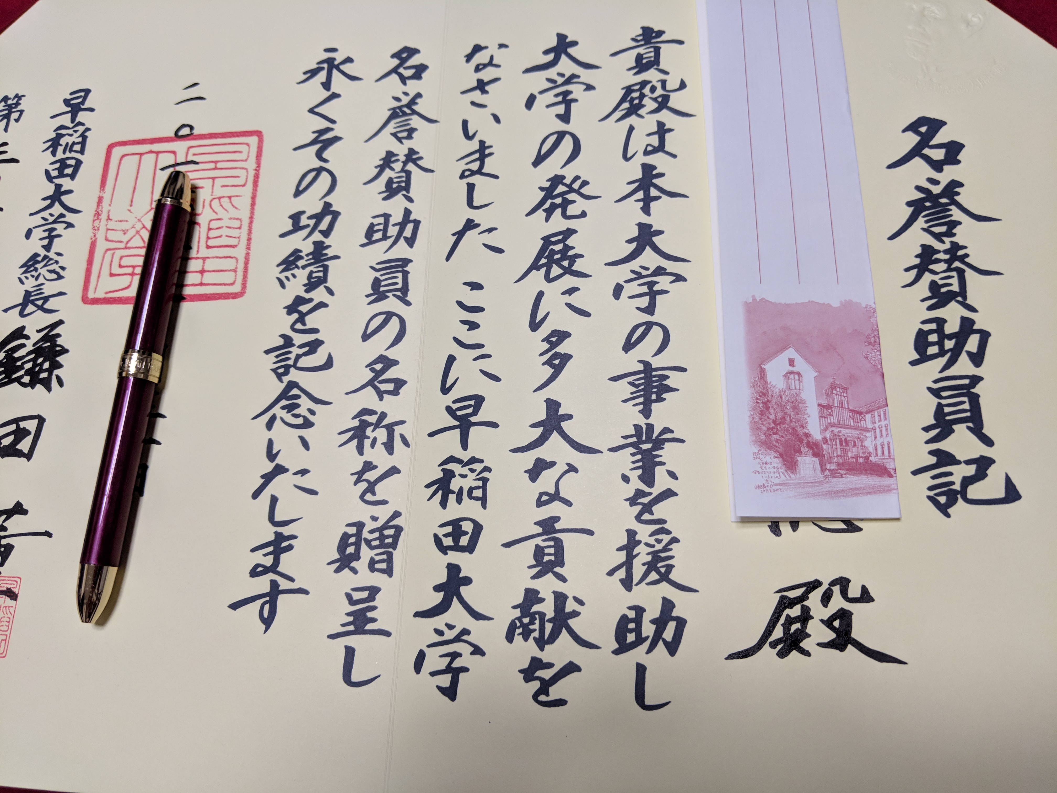 早稲田大学名誉賛助員の名称贈呈